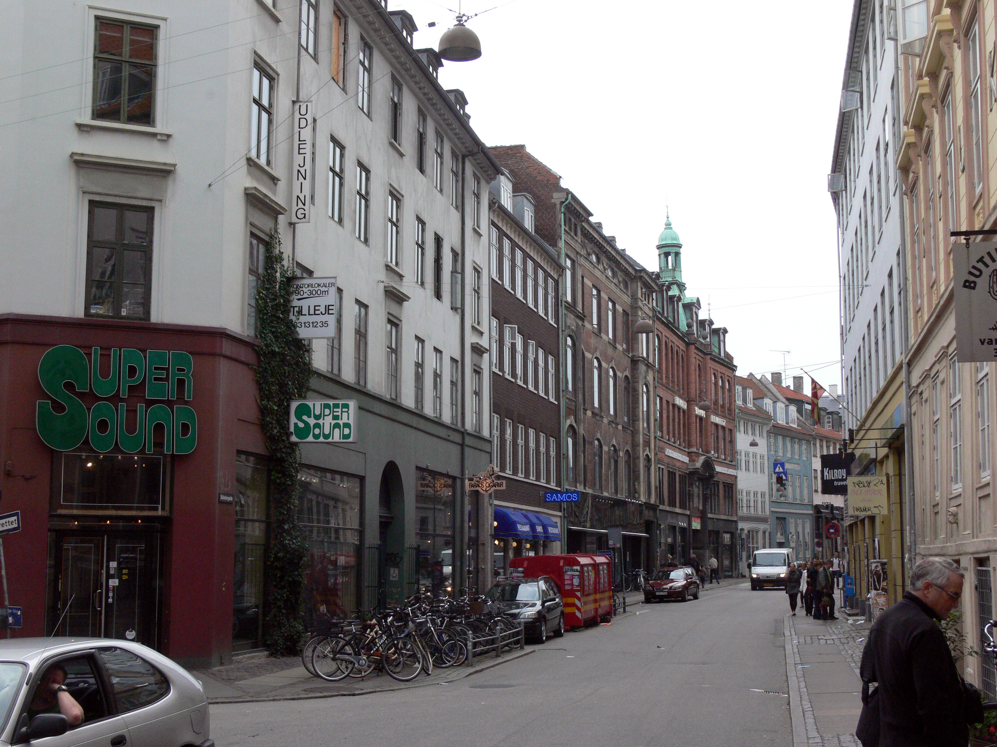 Skindergade in Kopenhagen.